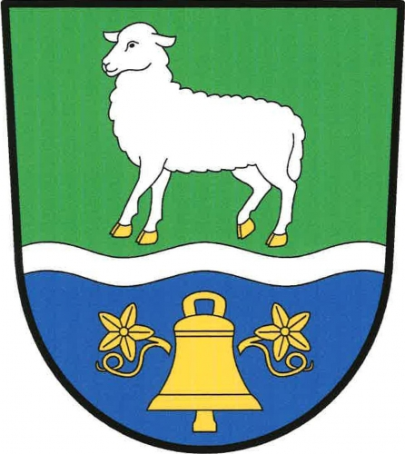 znak, Ovčáry, okres Mělník